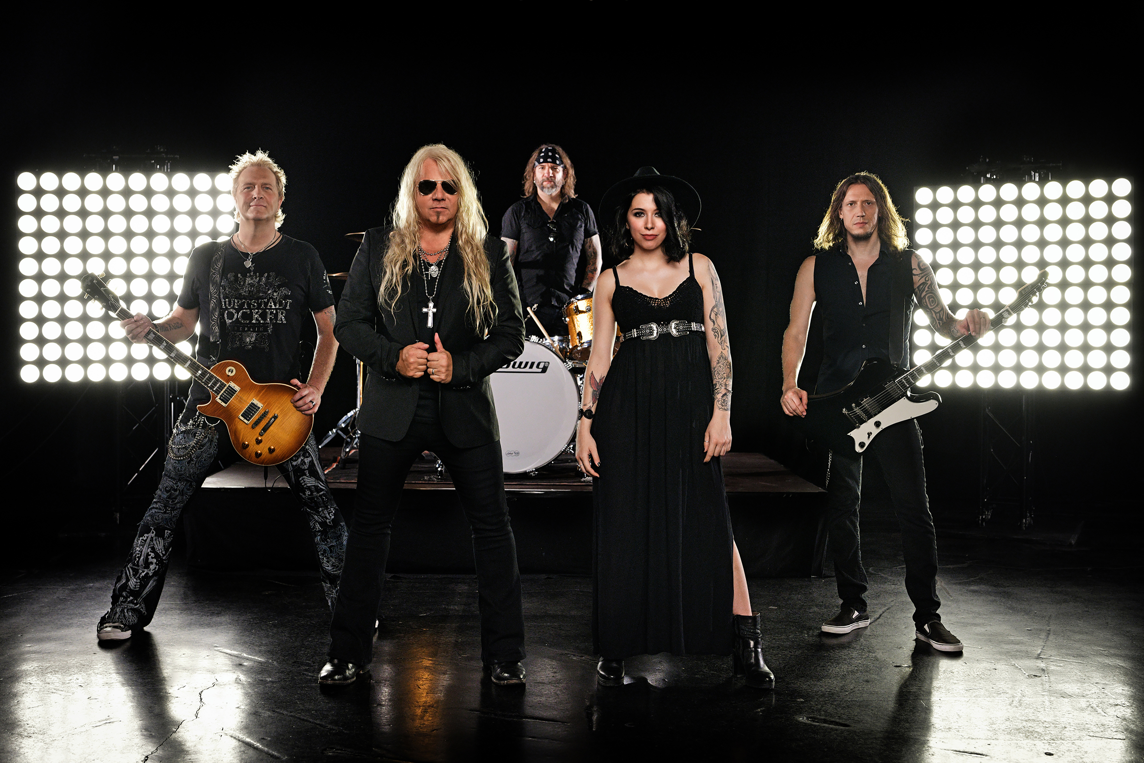 Sinner line-up 2019 "Santa Muerte"